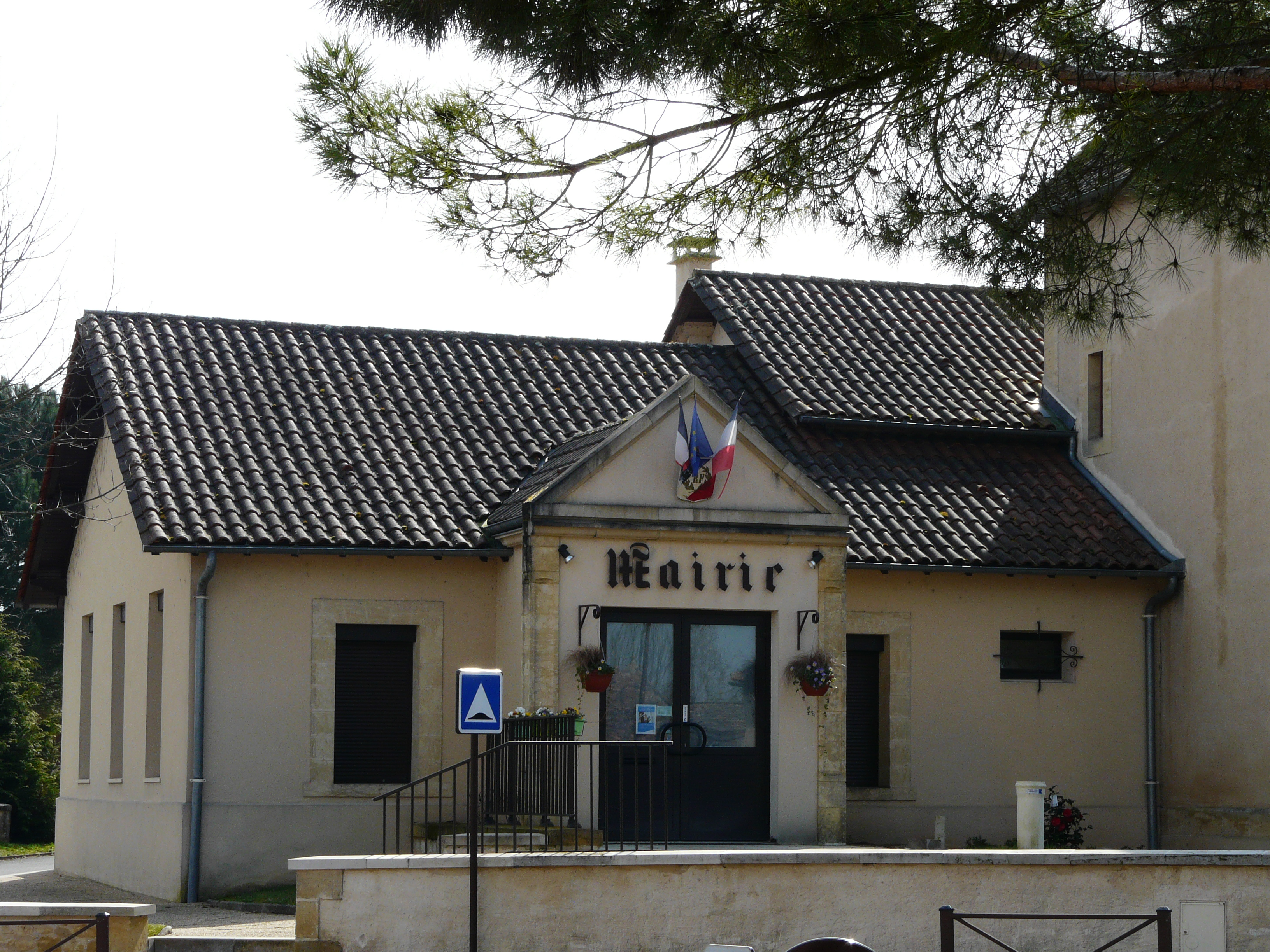 La mairie de Cours-de-Pile, Dordogne, France.